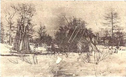 подпись в источнике: «Удэхейская юрта в виде двускатной крыши, сделанной из елового корья.»